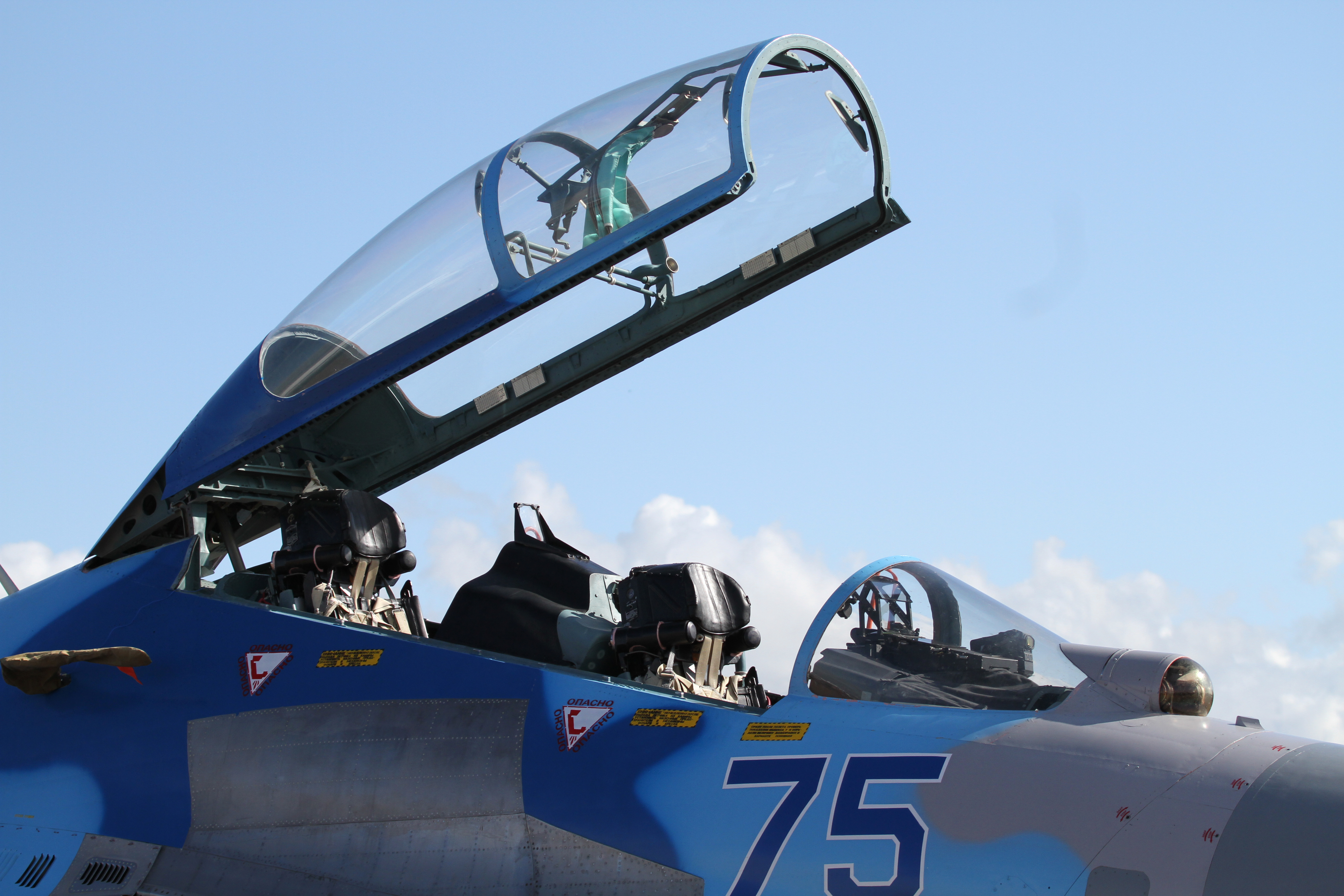 SU-27 Flanker 05